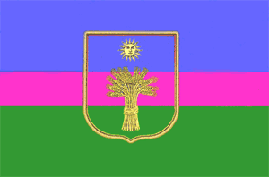 Прапор Віньковецького району